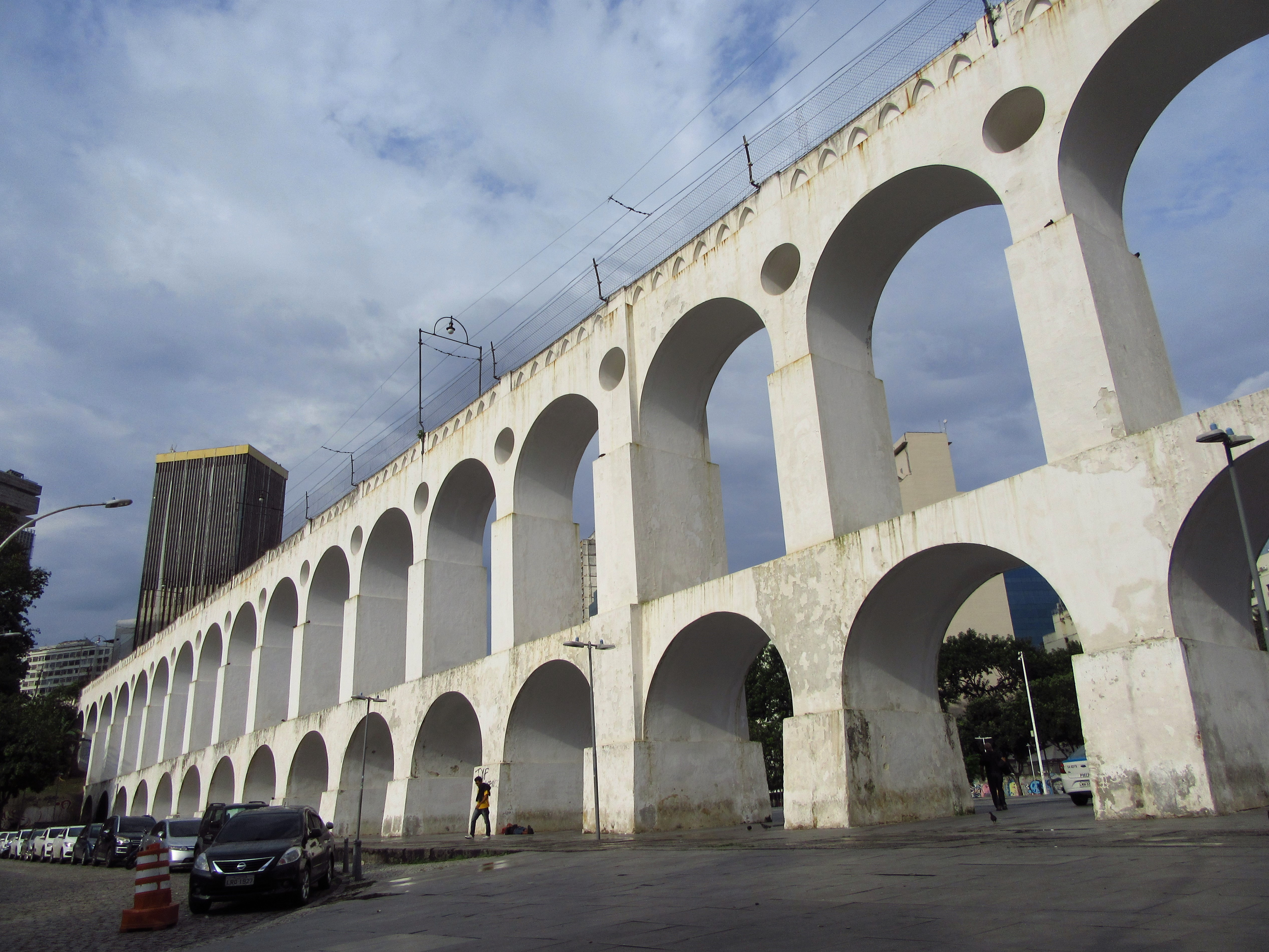 El Acueducto Carioca, popularmente conocido como Arcos da Lapa por encontrarse en la zona de Lapa,1 es una estructura monumental del Centro de Río de Janeiro, Brasil. Considerada como un hito de la arquitectura colonial de Brasil, es hoy una de las postales de la ciudad, el símbolo más representativo de la antigua conservada en el bohemio de río Lapa.